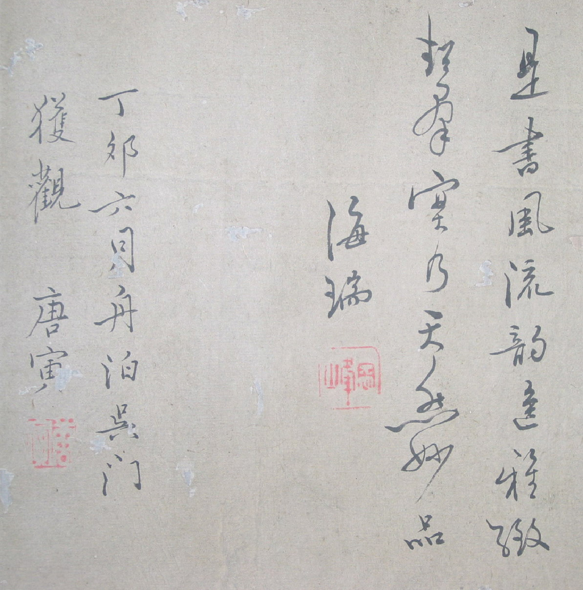 《蓬戶手卷》前代名人題跋.